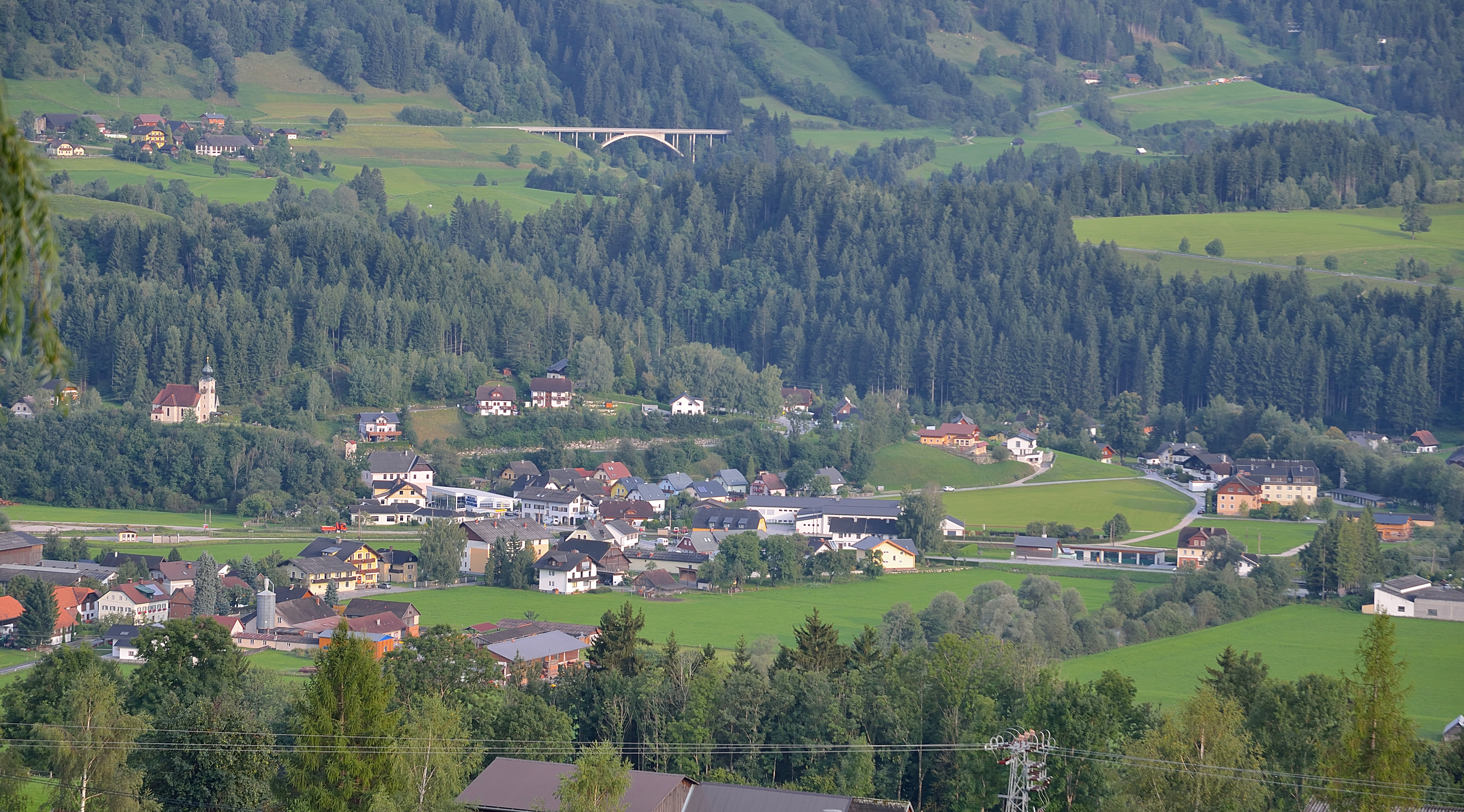 Blick von Gröbming hinunter ins Ennstal nach Stein an der Enns.